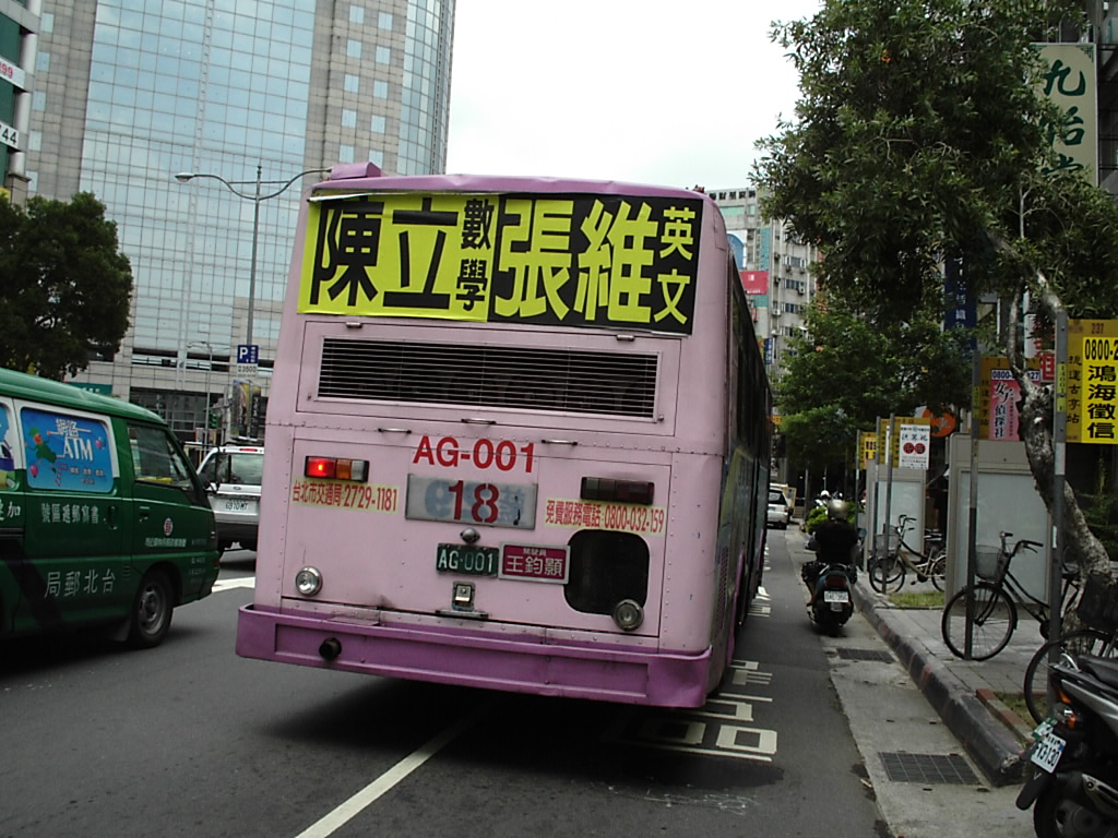 欣欣客運AG-001，底盤為Isuzu LT133L。